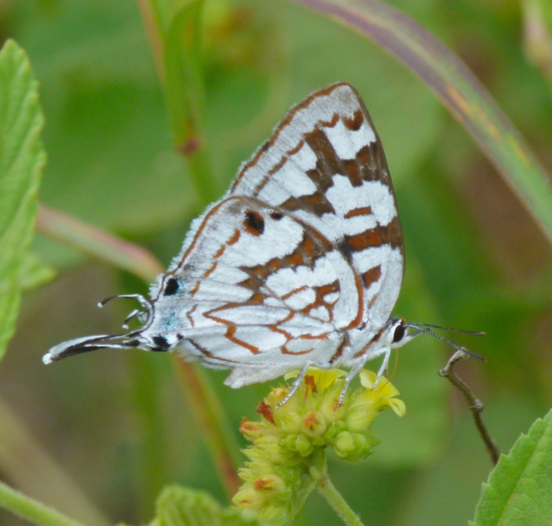 S39 near Timbavati, Kruger NP, SOUTH AFRICA